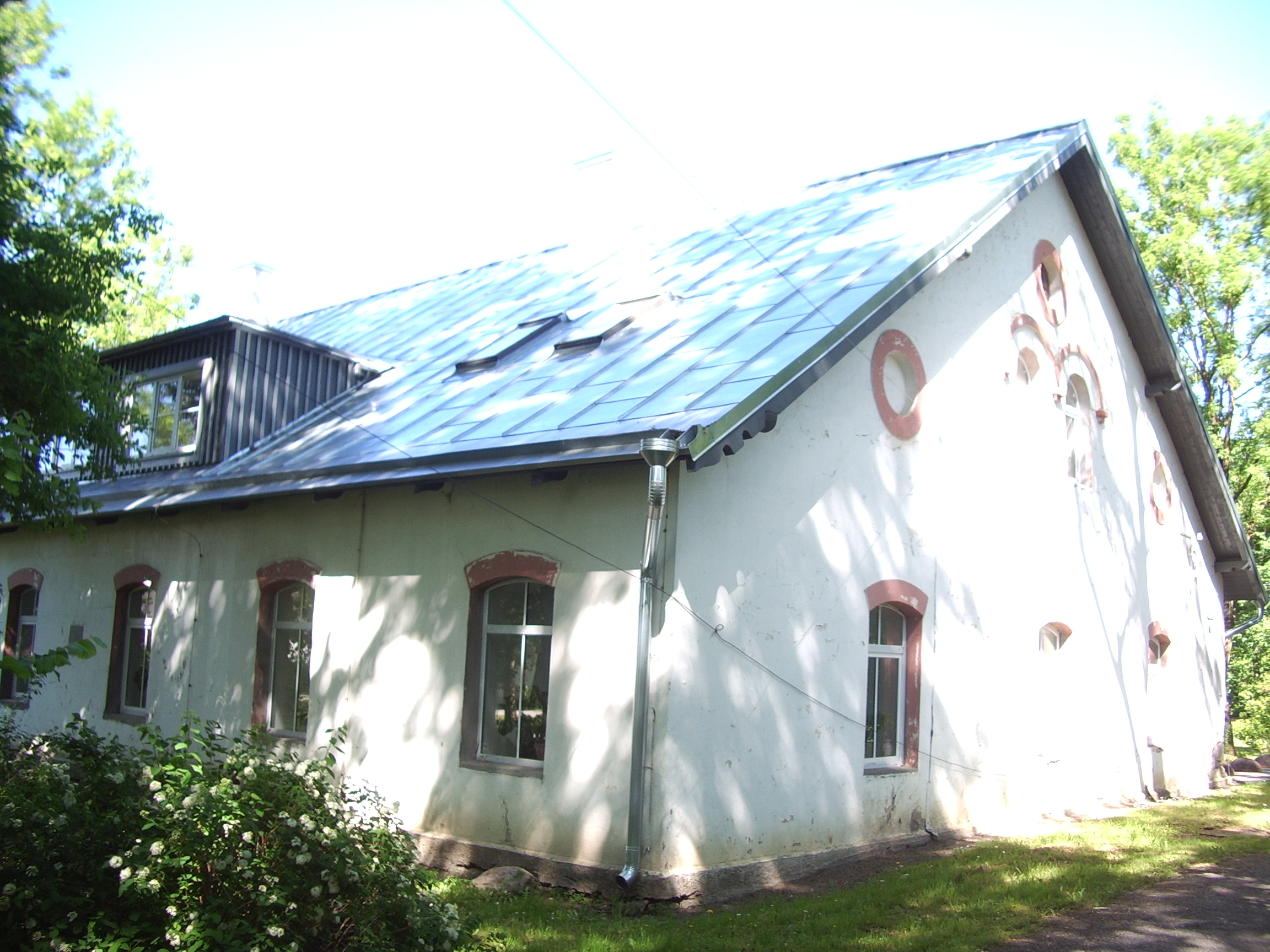 Kehtna mõisa valitsejamaja Pargi tänav 2 Kehtnas